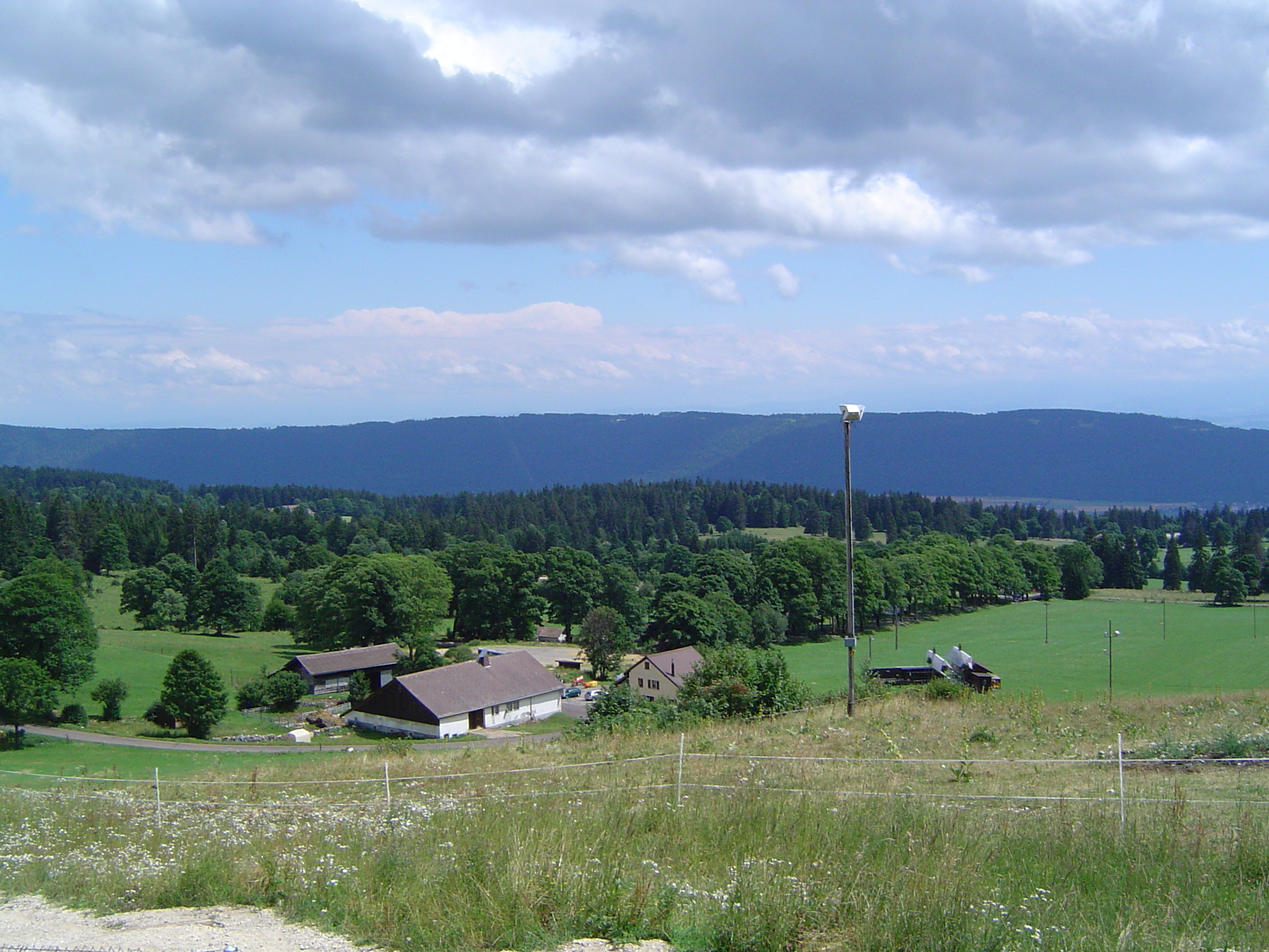 Photo prise depuis le col de la Vue des Alpes en Suisse 2005. Cevenol2